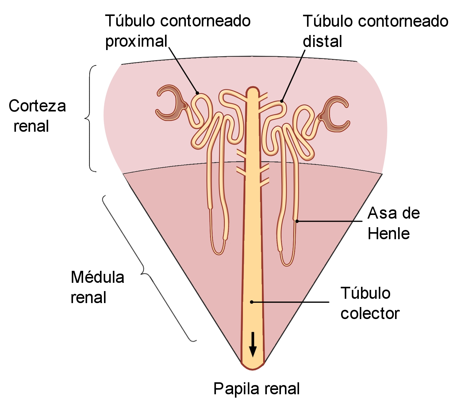 Esquema en el se muestra como varios túbulos contorneados distales del riñón convergen en un túbulo colector.